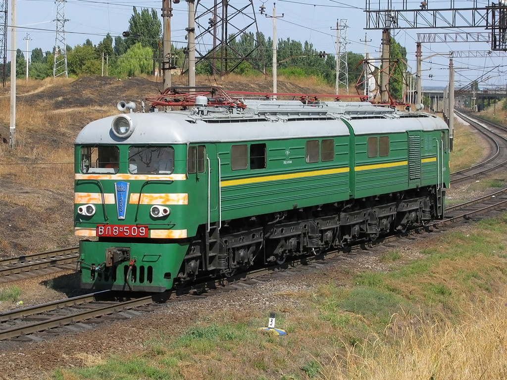 Электровоз ВЛ8м-509 неподалёку от ст.Никополь, Украина